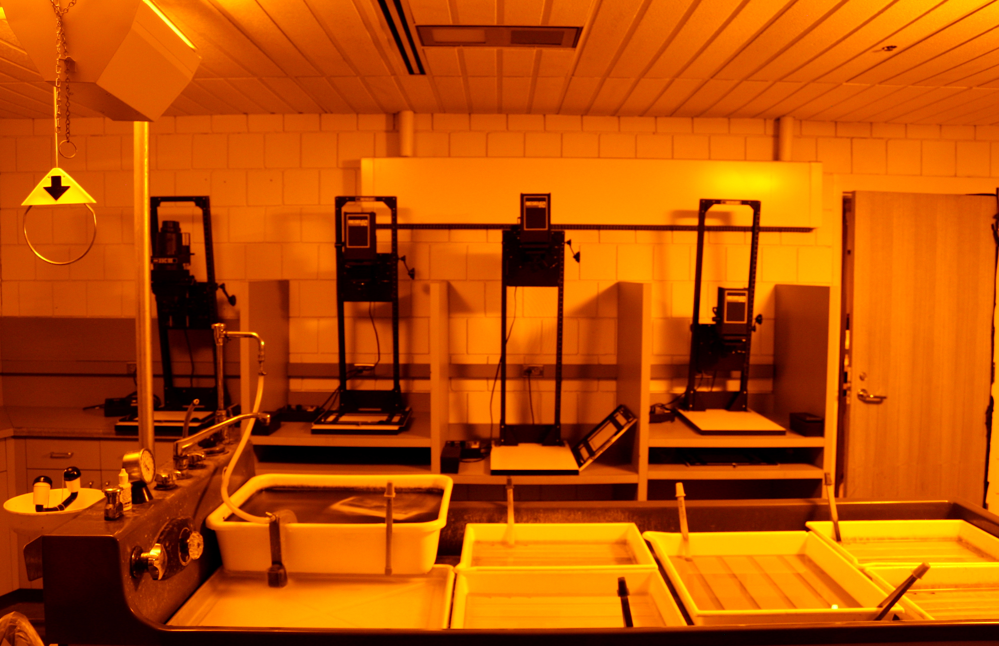 MCTC Darkroom